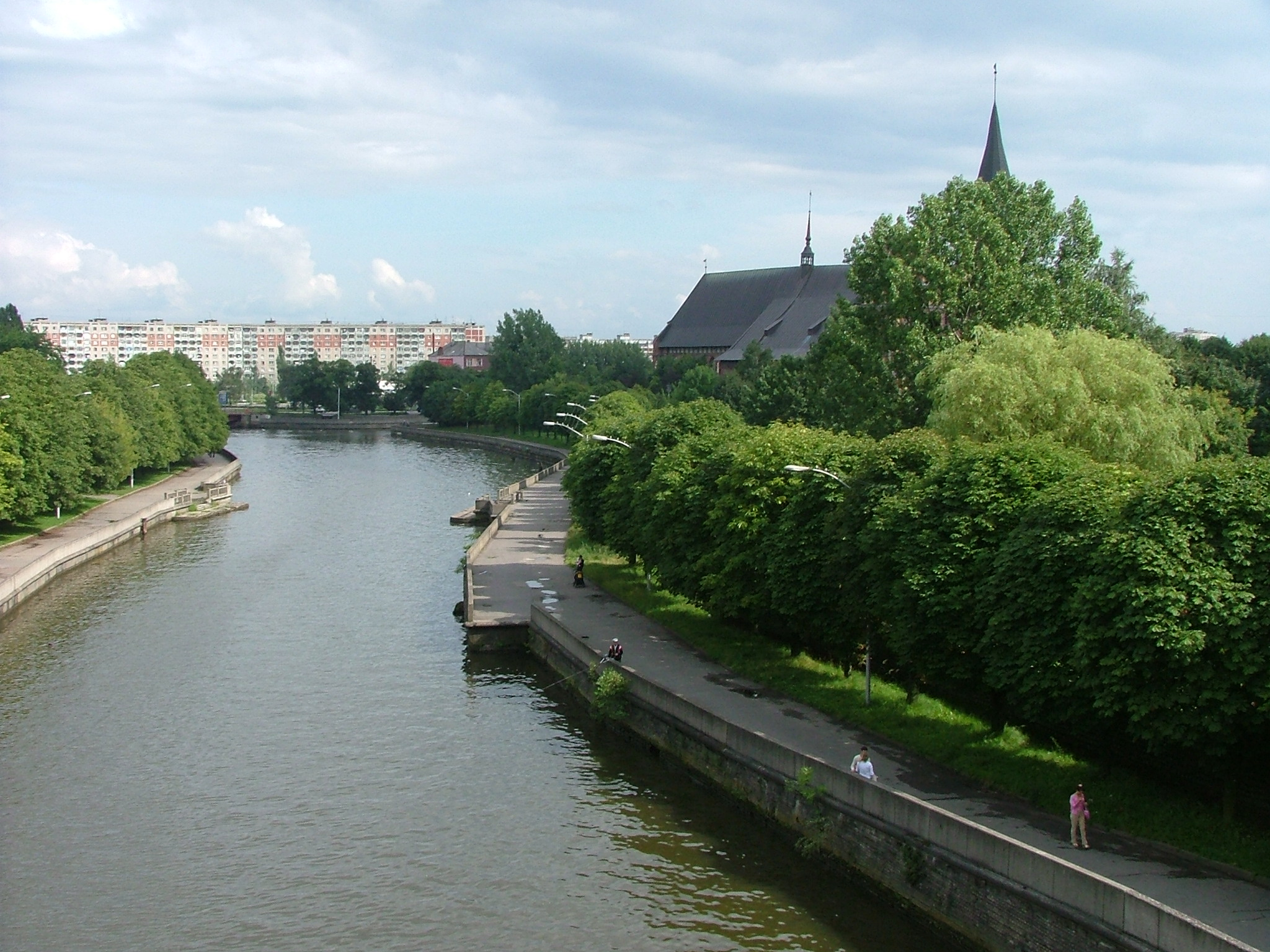 Pregel in Kaliningrad, Russland.